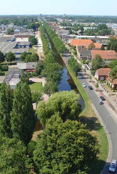 De lintbebouwing langs het Stadskanaal (gezien vanaf de watertoren)